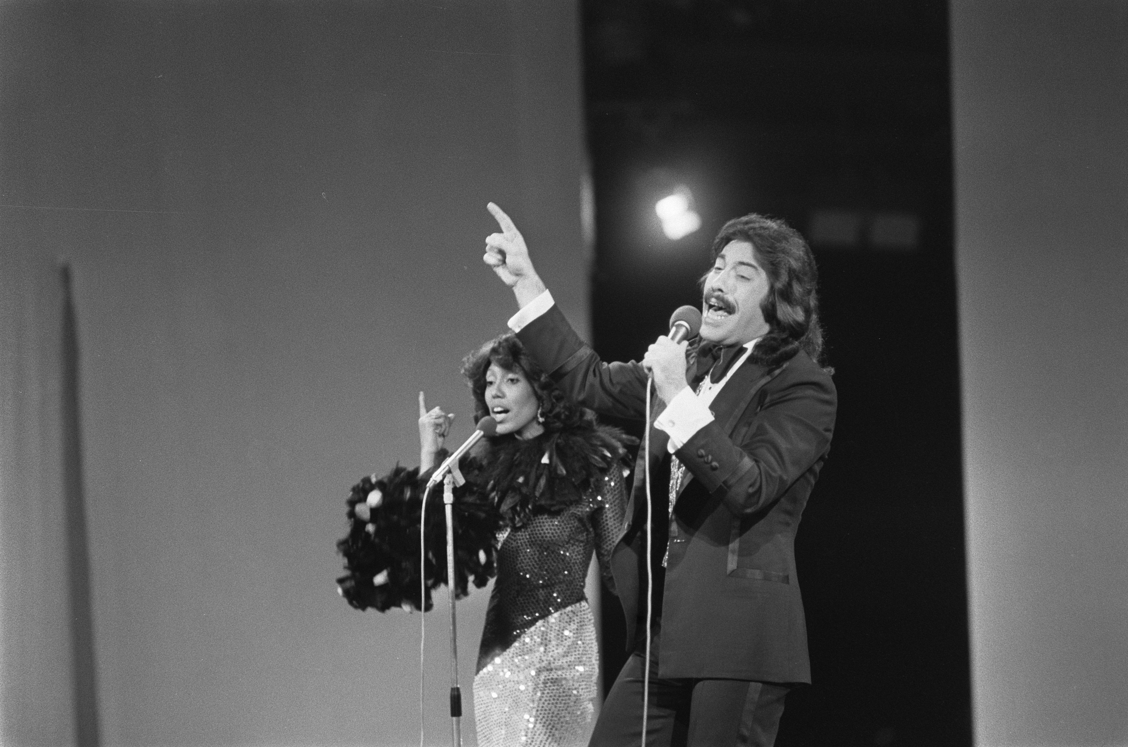 Collectie / Archief : Fotocollectie Anefo Reportage / Serie : Grand Gala du Disque in de RAI Beschrijving : Tony Orlando & Dawn Datum : 17 februari 1974 Locatie : Amsterdam, Noord-Holland Trefwoorden : festivals, zangers Persoonsnaam : Orlando, Tony Instellingsnaam : RAI Fotograaf : Fotograaf Onbekend / Anefo Auteursrechthebbende : Nationaal Archief Materiaalsoort : Negatief (zwart/wit) Nummer archiefinventaris : bekijk toegang 2.24.01.05 Bestanddeelnummer : 927-0100